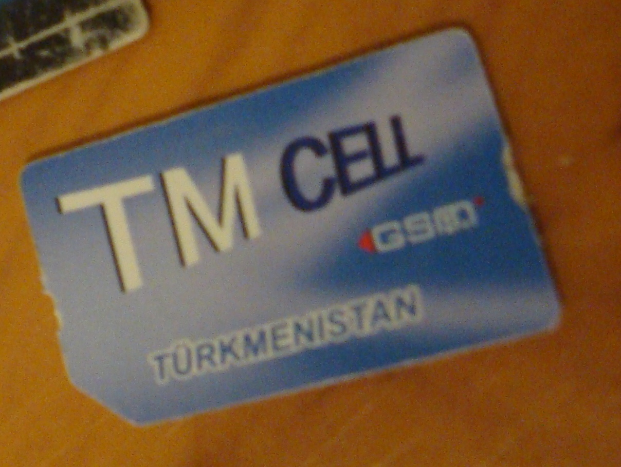 Сим-карта Алтын Асыр GSM